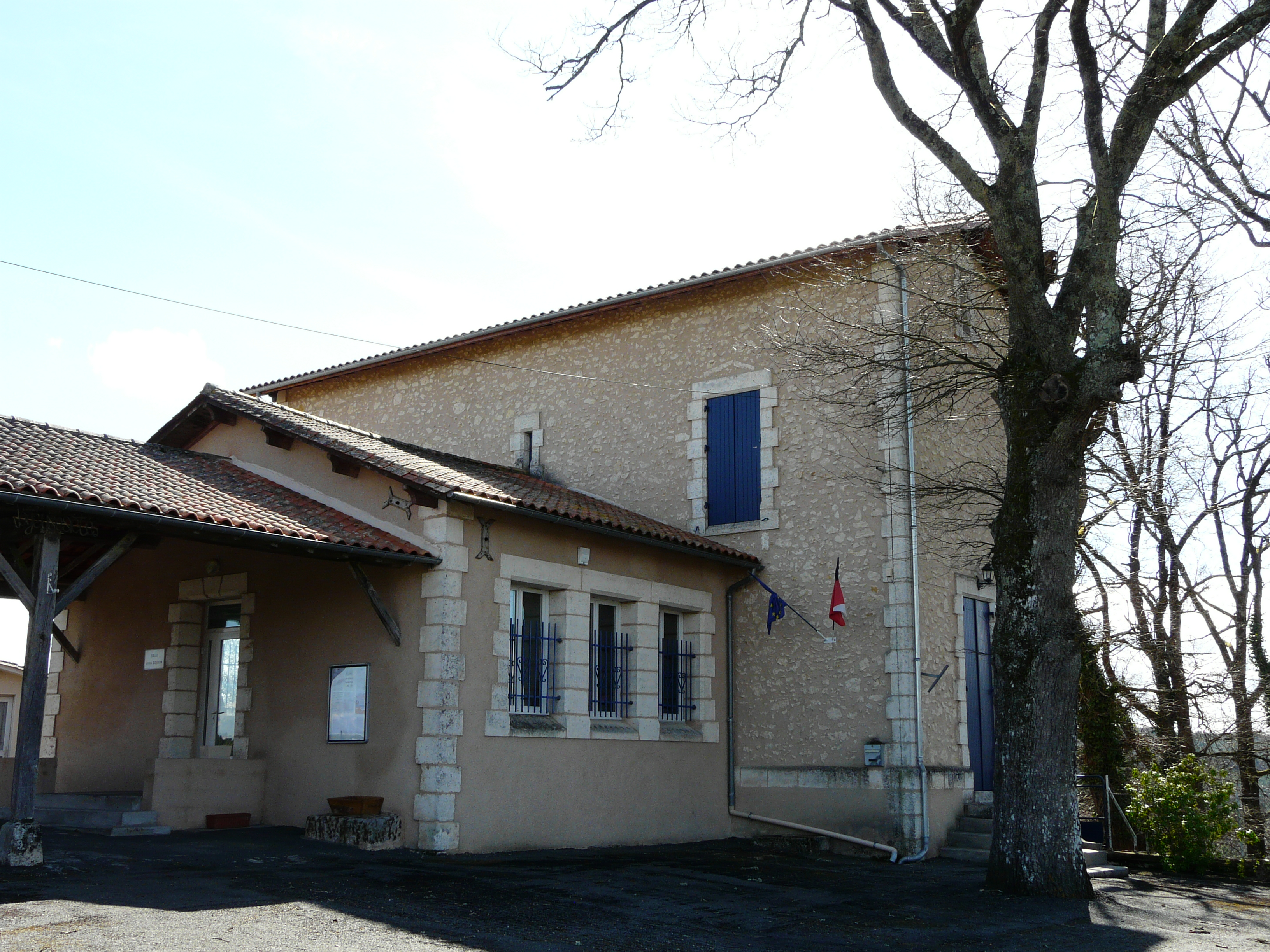 La mairie de Saint-Étienne-de-Puycorbier, Dordogne, France.